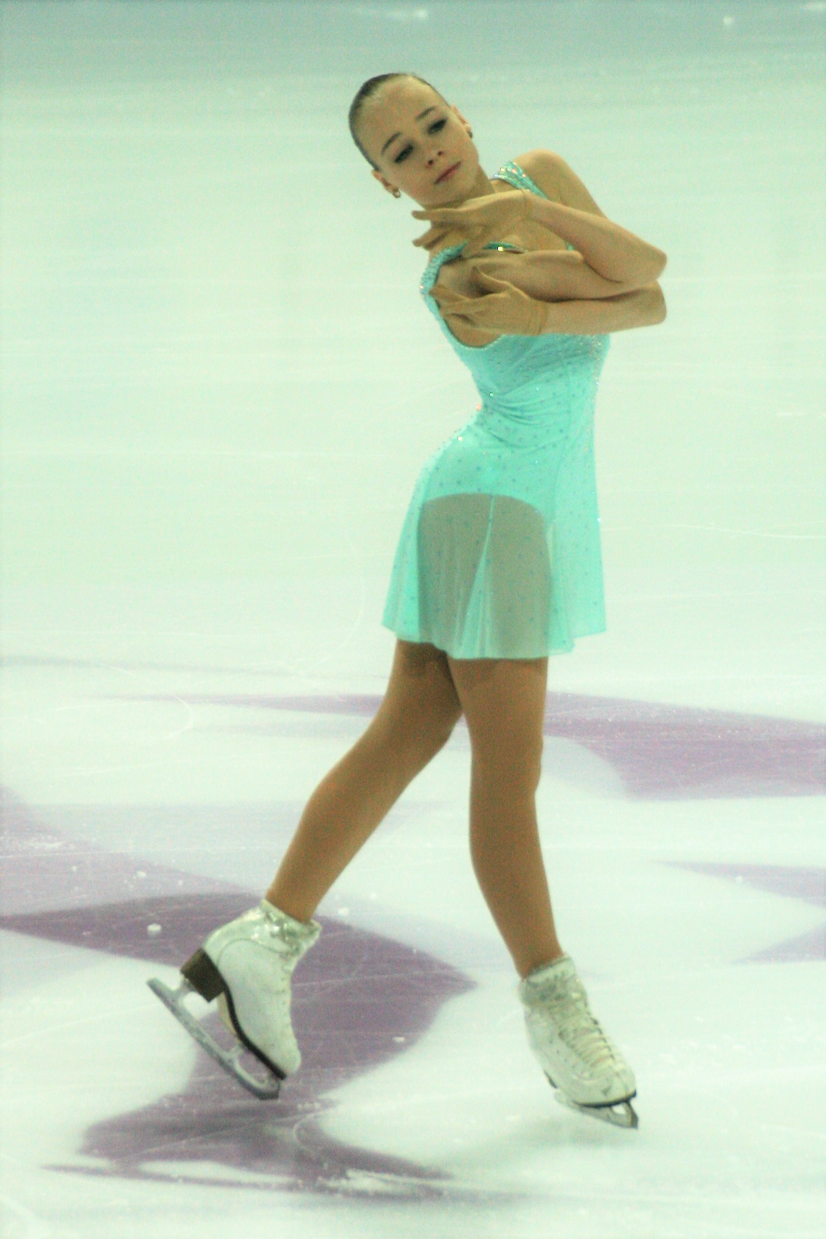 Анастасия Губанова (Россия) на финале Гран-при по фигурному катанию среди юниоров 2016-2017